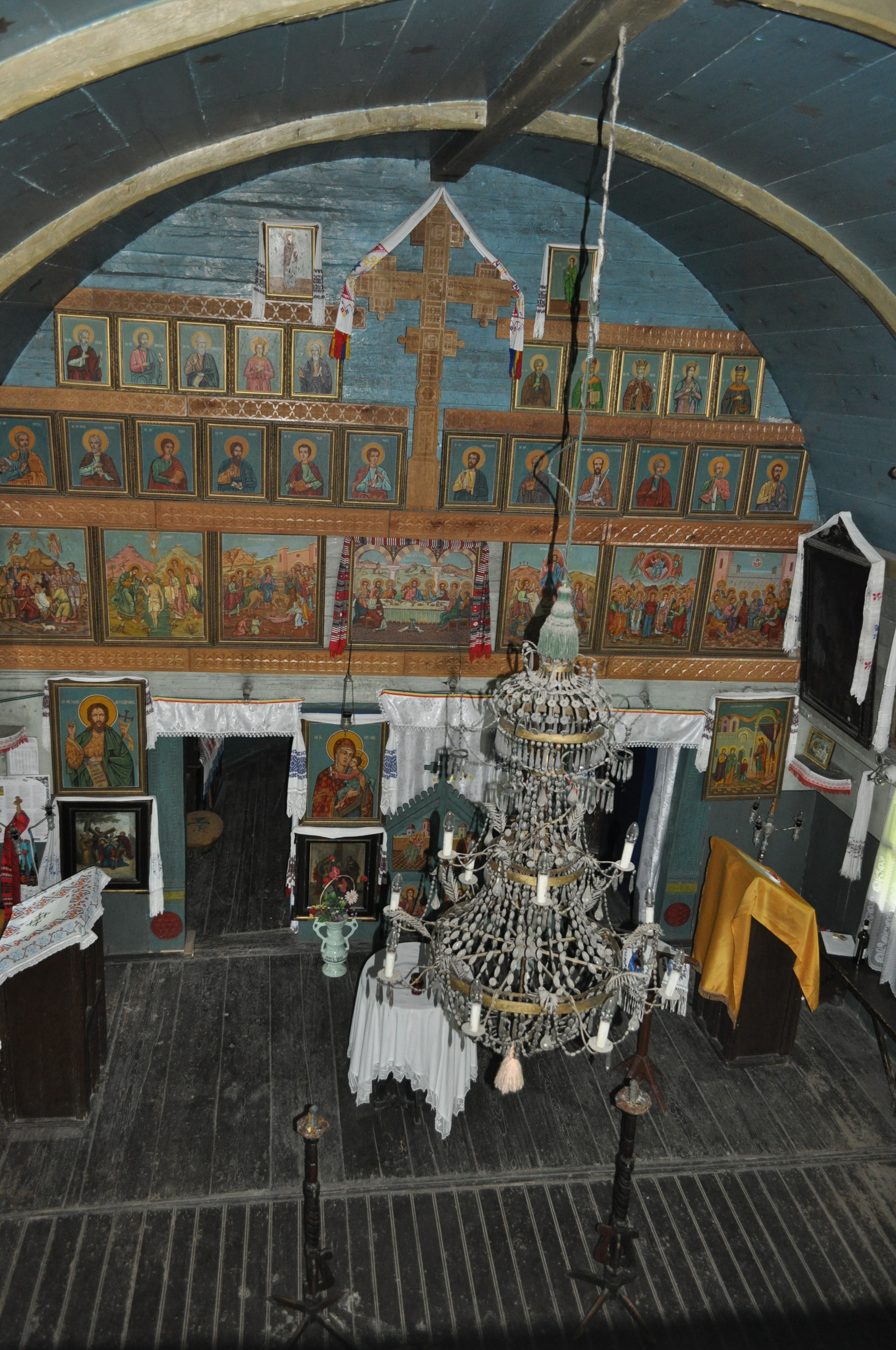 Biserica de lemn din Cojocna, județul Cluj